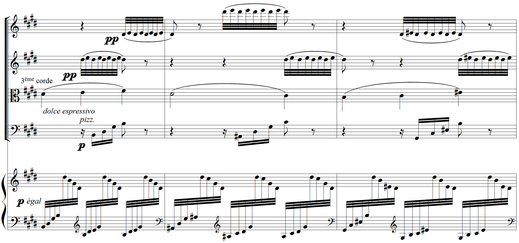 Louis Vierne : Quintette avec piano op.42 - thème du 2nd mouvement